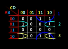 Mapa de Karnaugh cona colores.